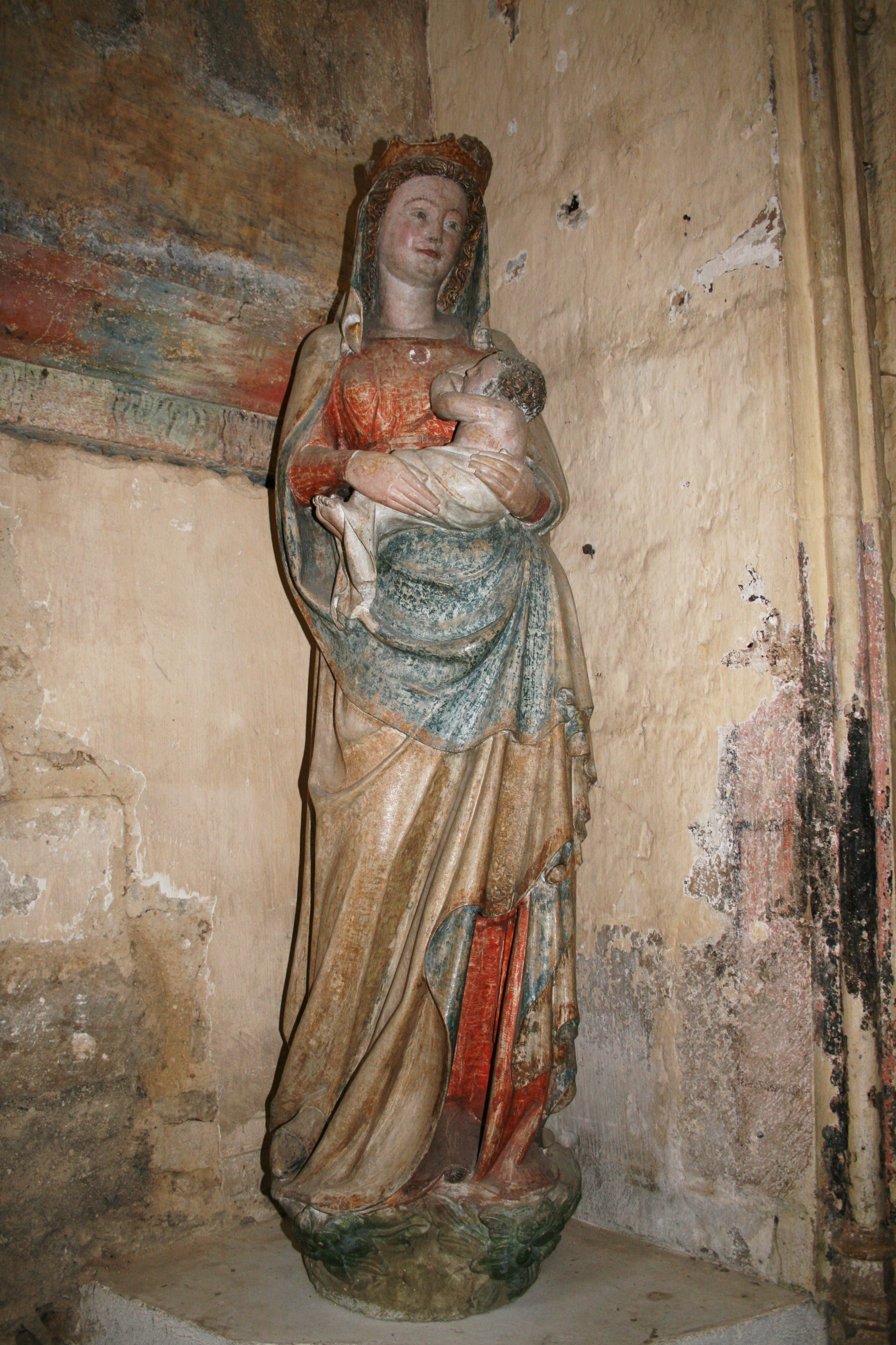 Flavigny sur Ozerain Eglise Saint Genest Vierge